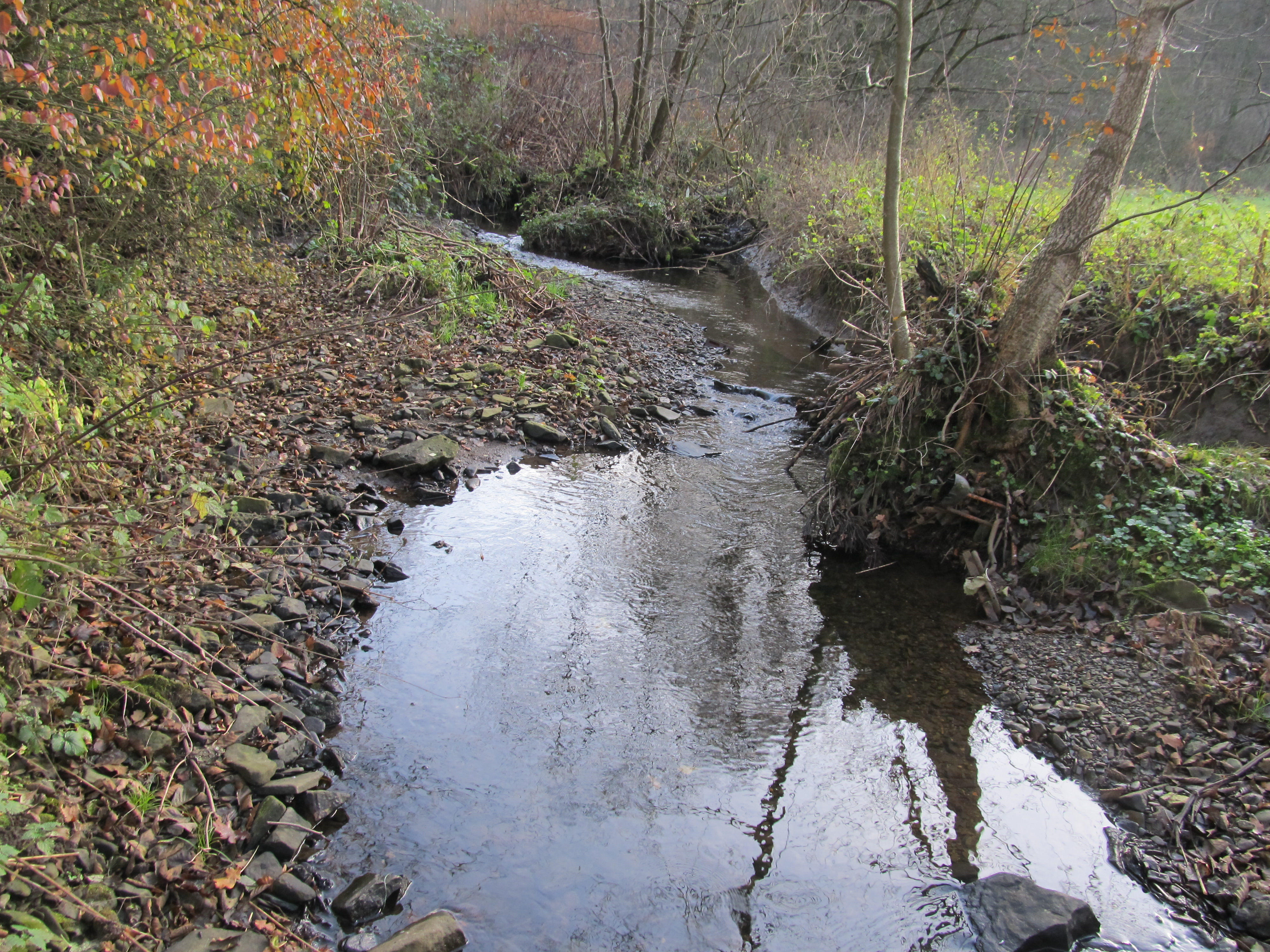 Naturverlauf 29.11.11